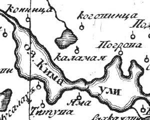 Деревня Каламая на карте 1745 года